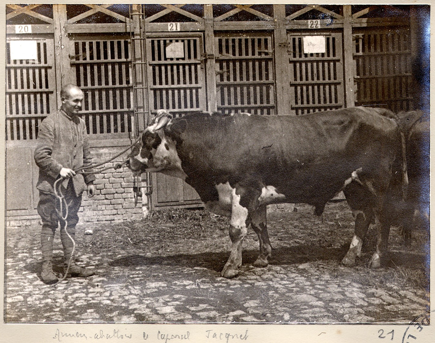 Vue du caporal Jacquet tenant un boeuf par la longe dans la cour de l'abattoir d'Amiens (Somme). 1915. Guerre 1914-1918.